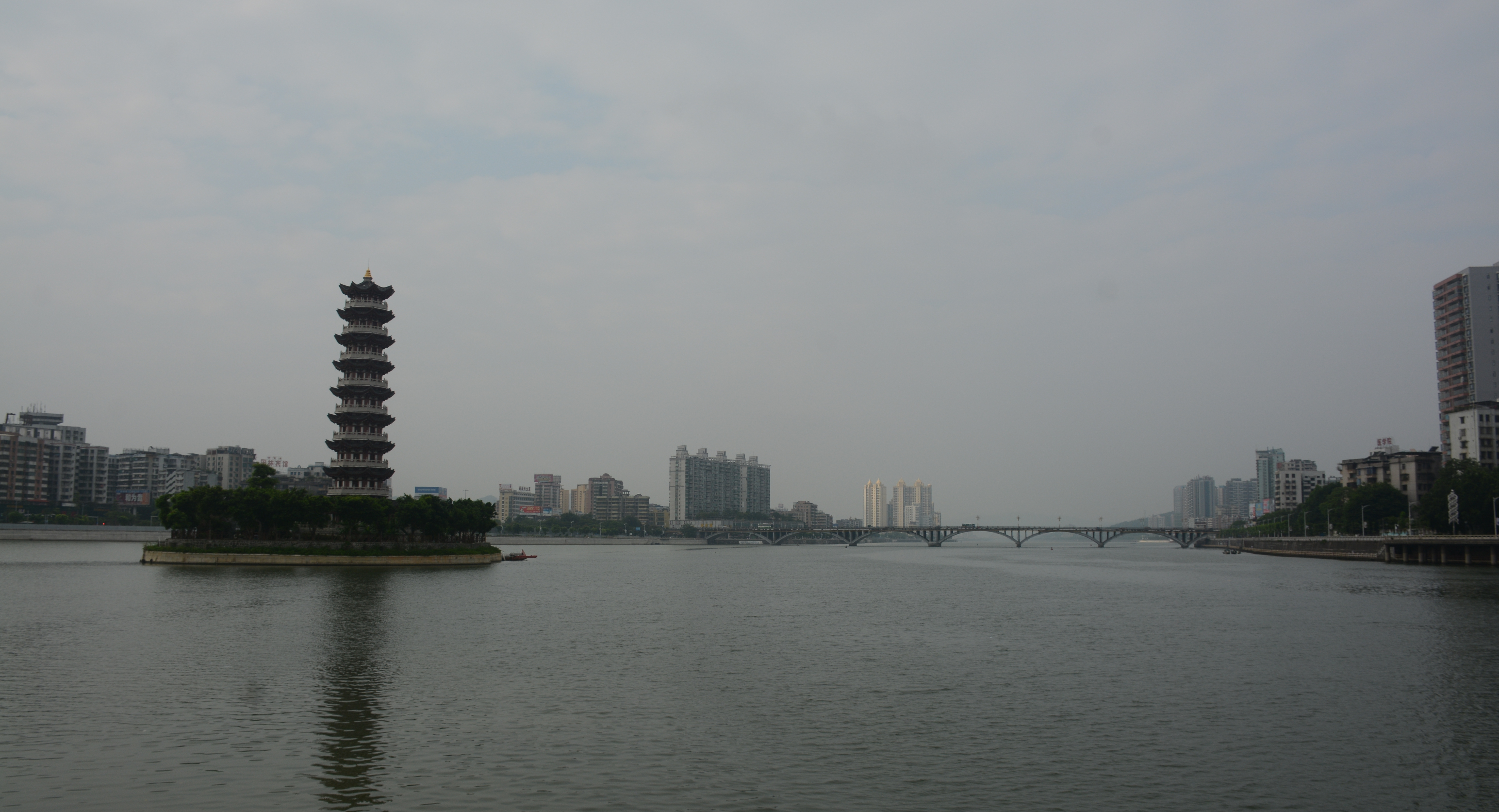 韶关浈江、武江交汇之处